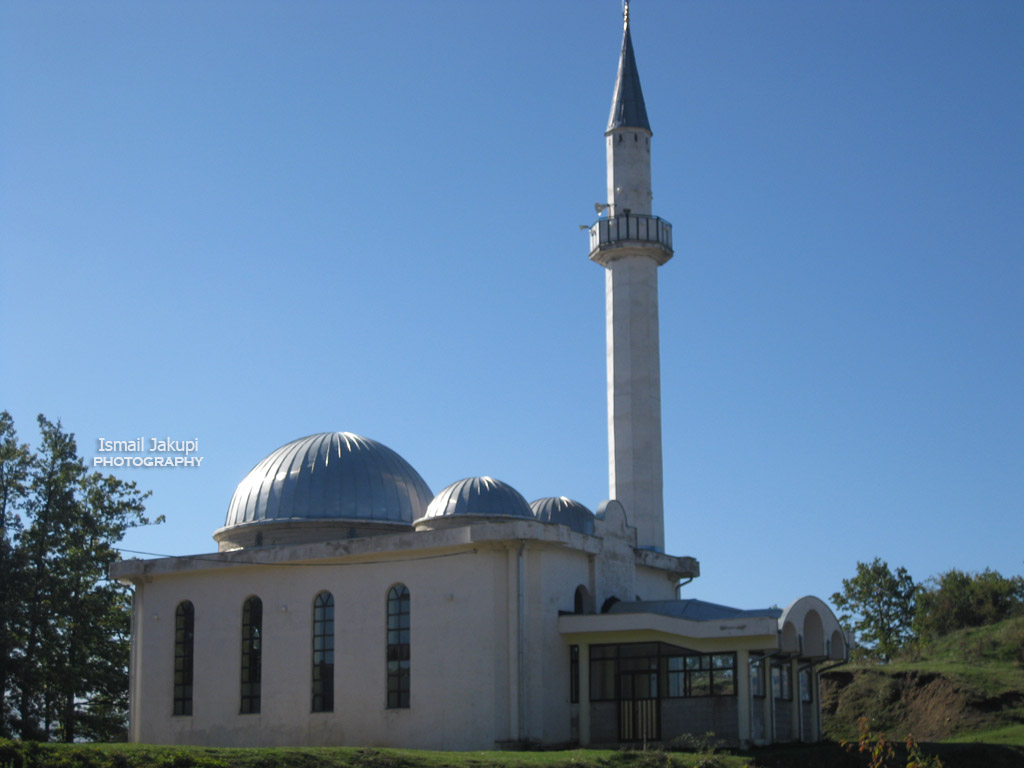 Xhamia e Brrutit-Vogël